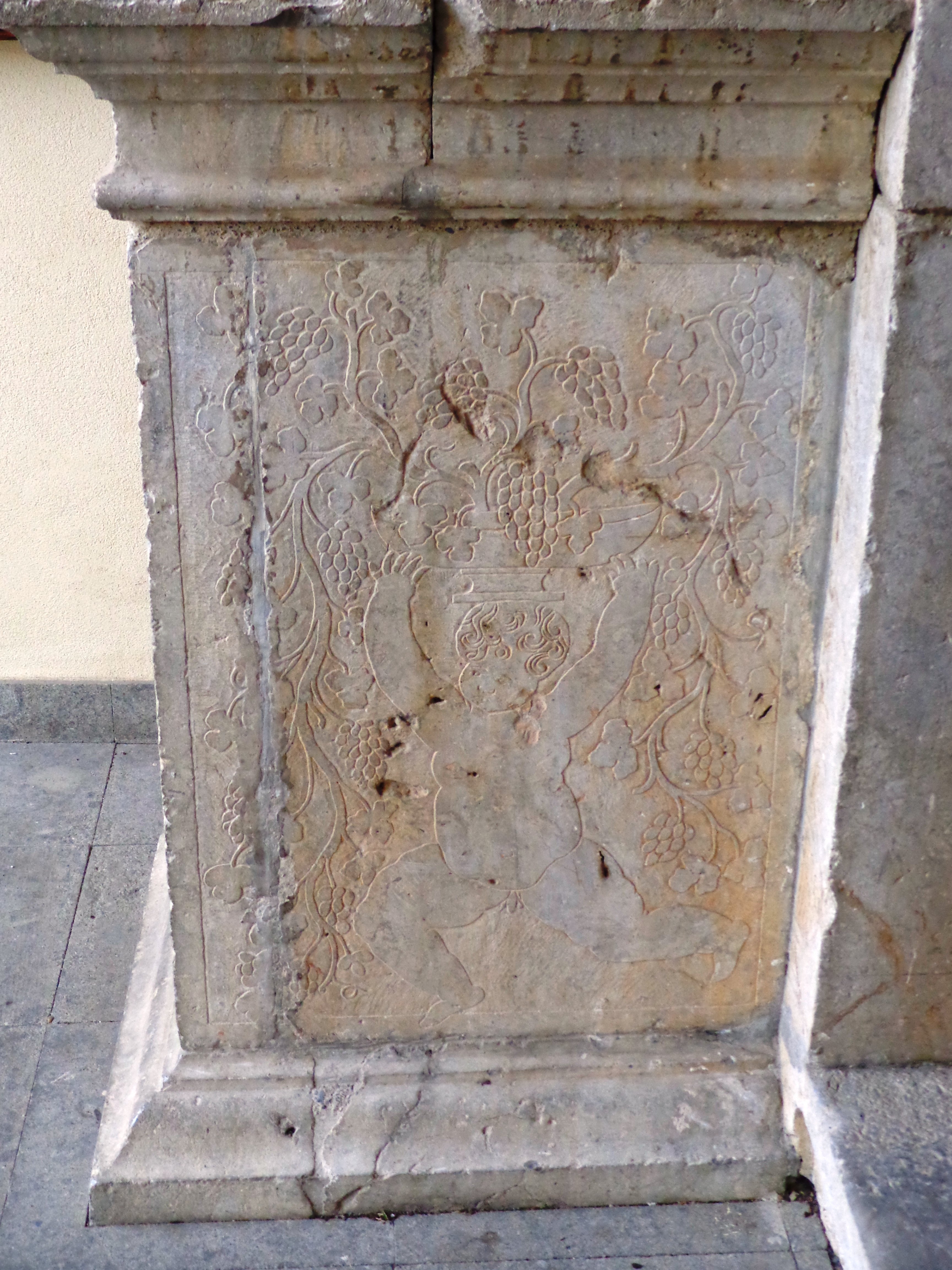 Cattedrale Patti 25